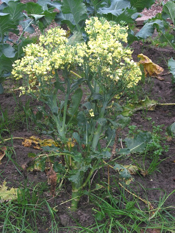 Broccoli